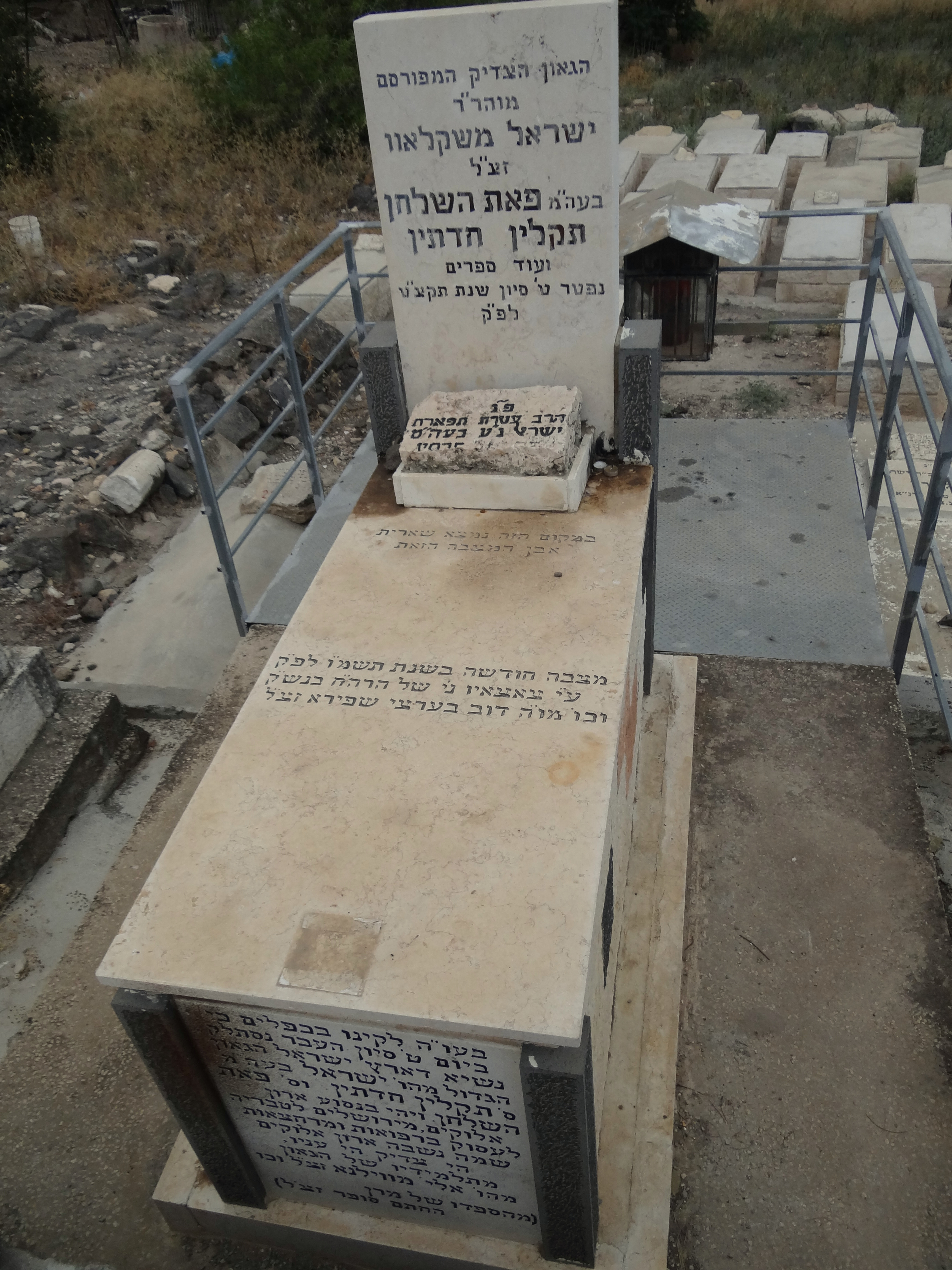 קברו של ישראל משקלאוו בבית הקברות הישן בטבריה